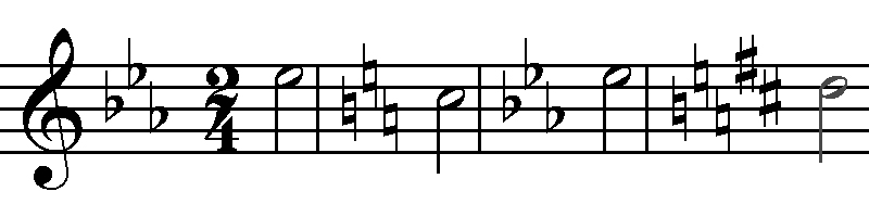 zenei módosítójelek - előjegyzésváltás 2.